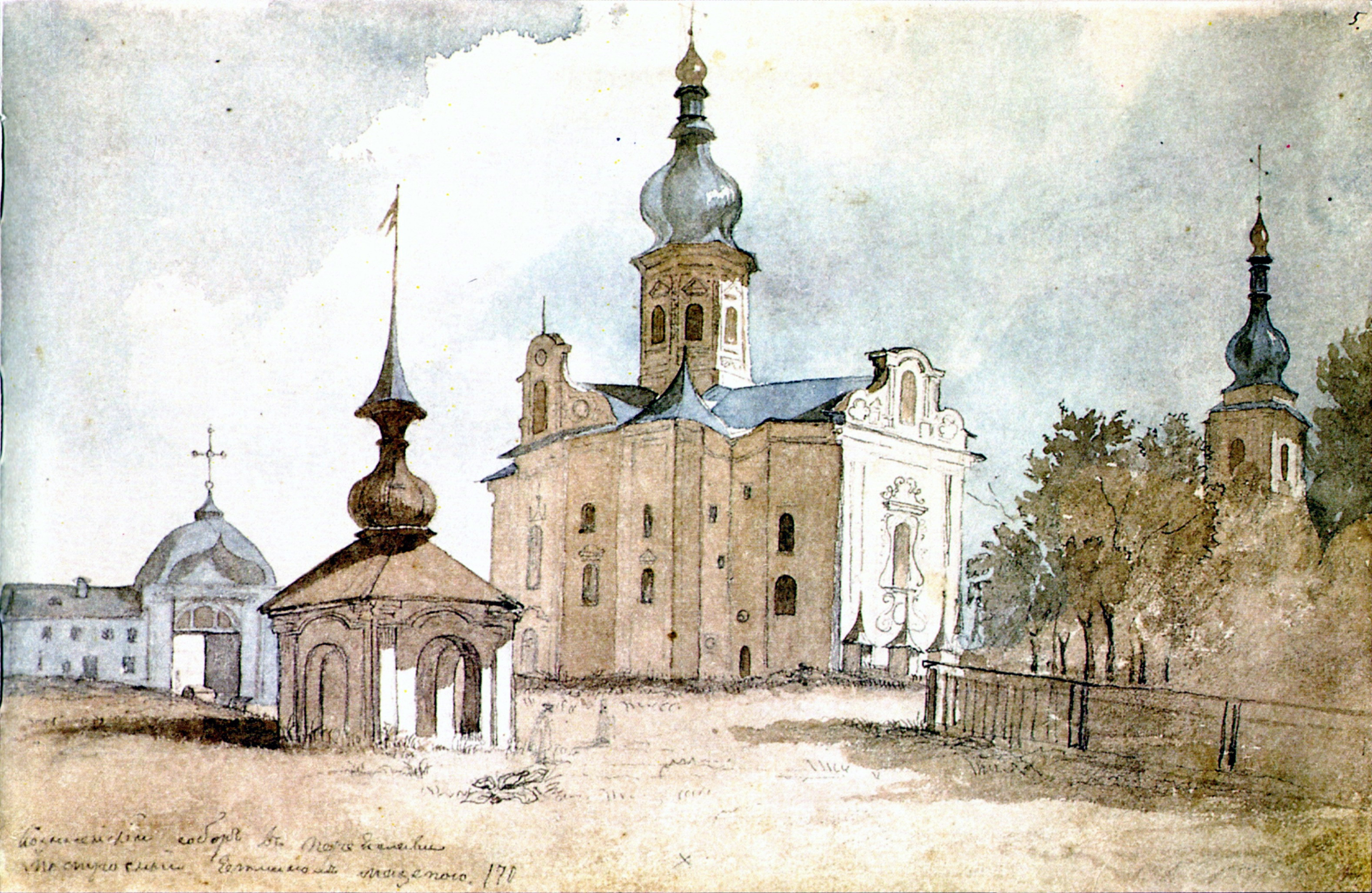 3. Малюнок Т.Г. Шевченка «Вознесенський собор в Переяславі»., Музей-діорама